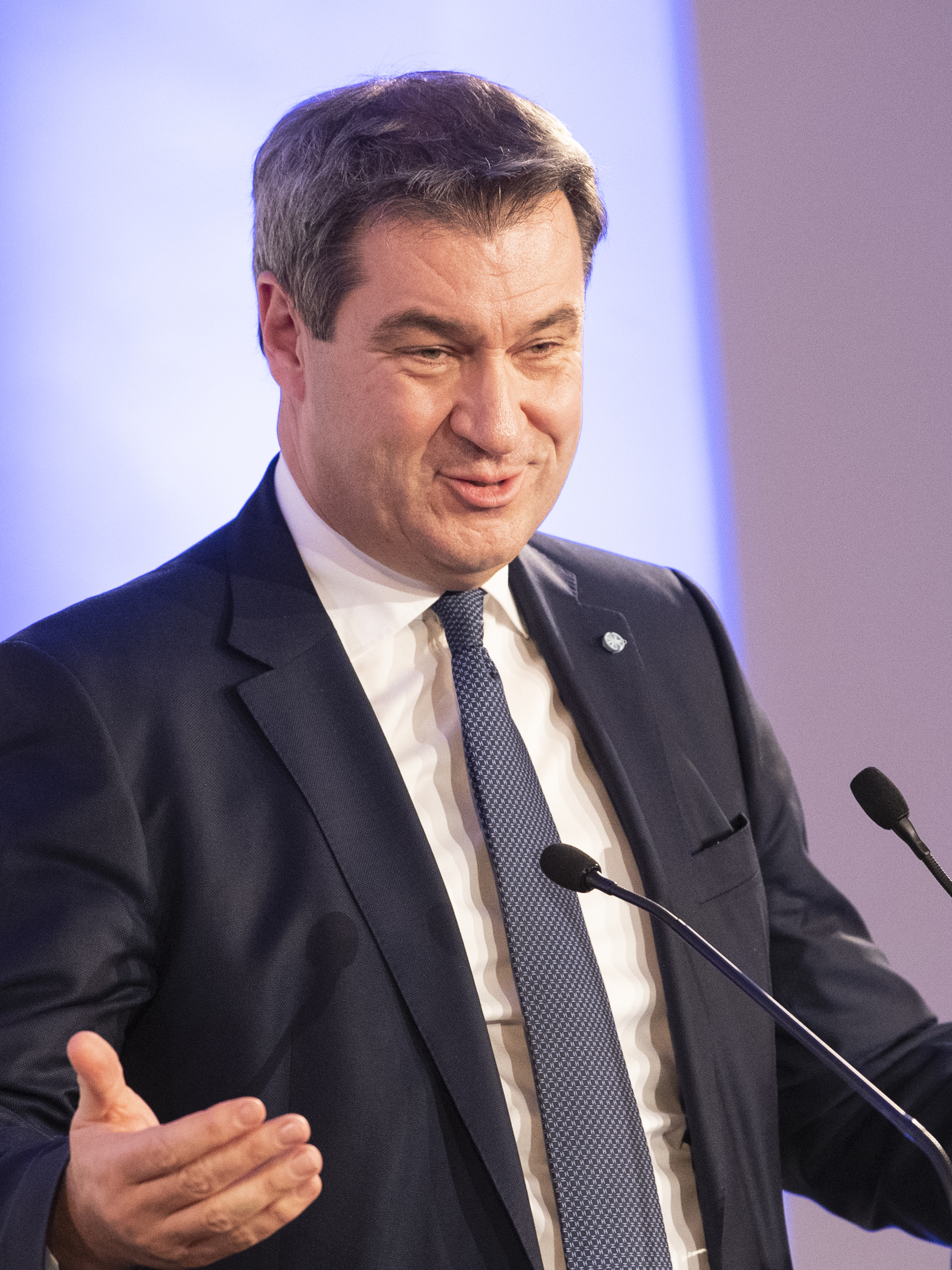 Markus Söder während der Münchener Sicherheitskonferenz 2019